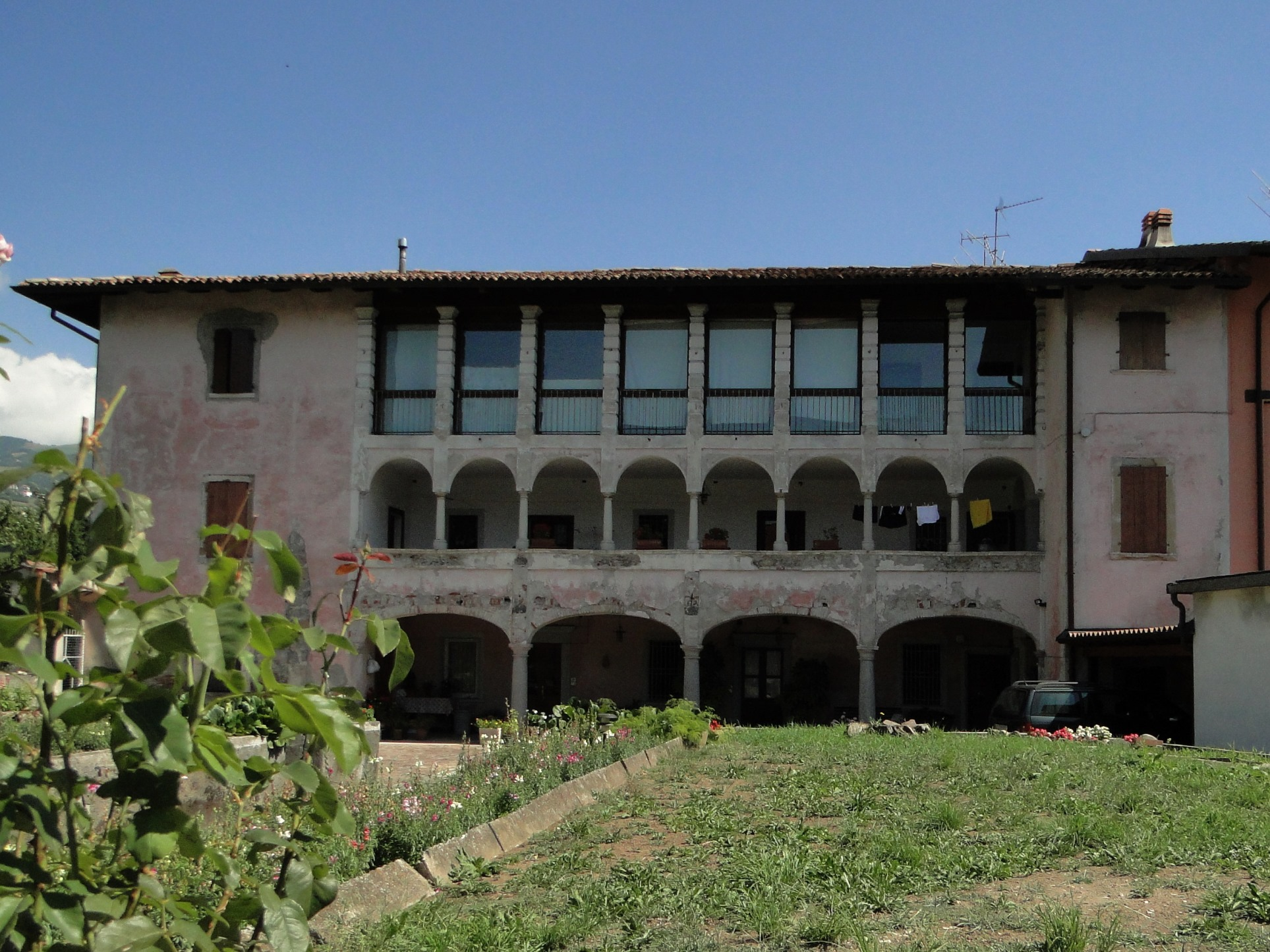 Casa Fanti, sec. XVI. Cene (BG), Italia